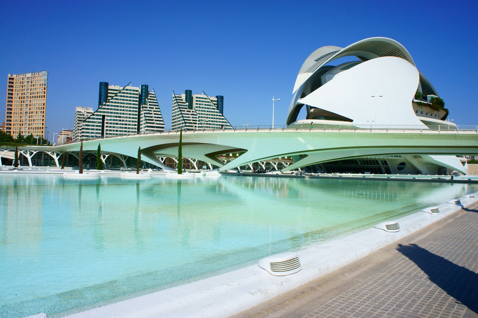 Дворц Искусств имени Королевы Софии